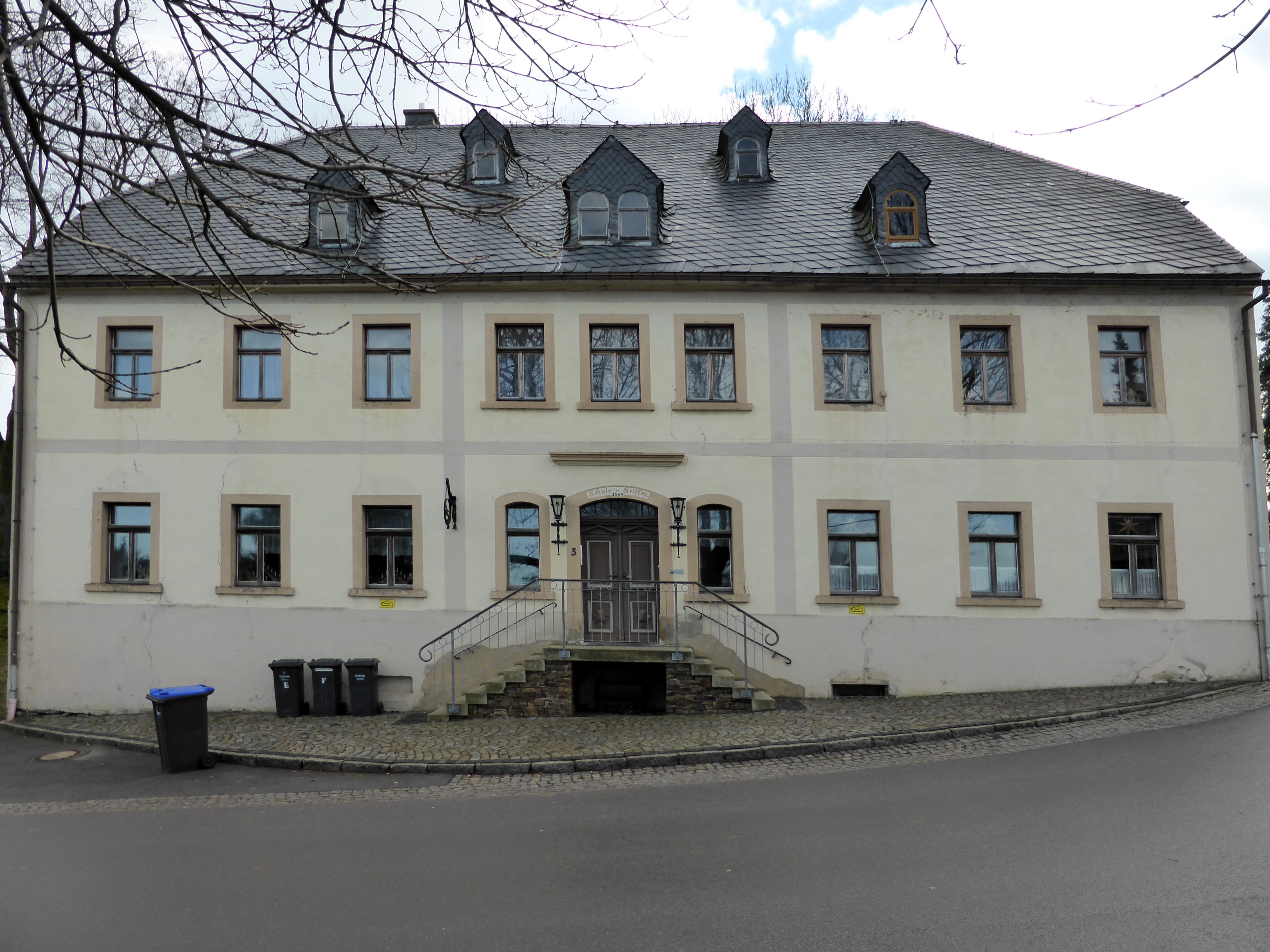 Schule zu Seiffen Anno 1864, Erzgebirgskreis - Sachsen.